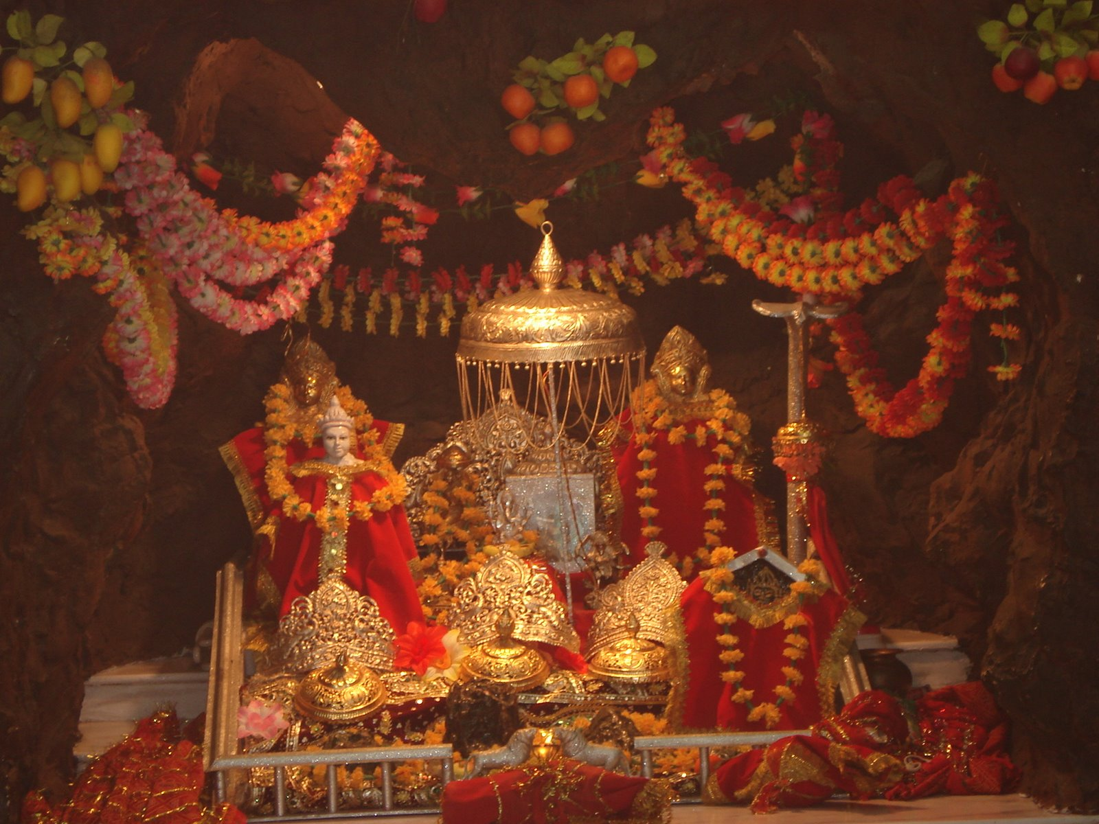 Vaisno devi Pindi